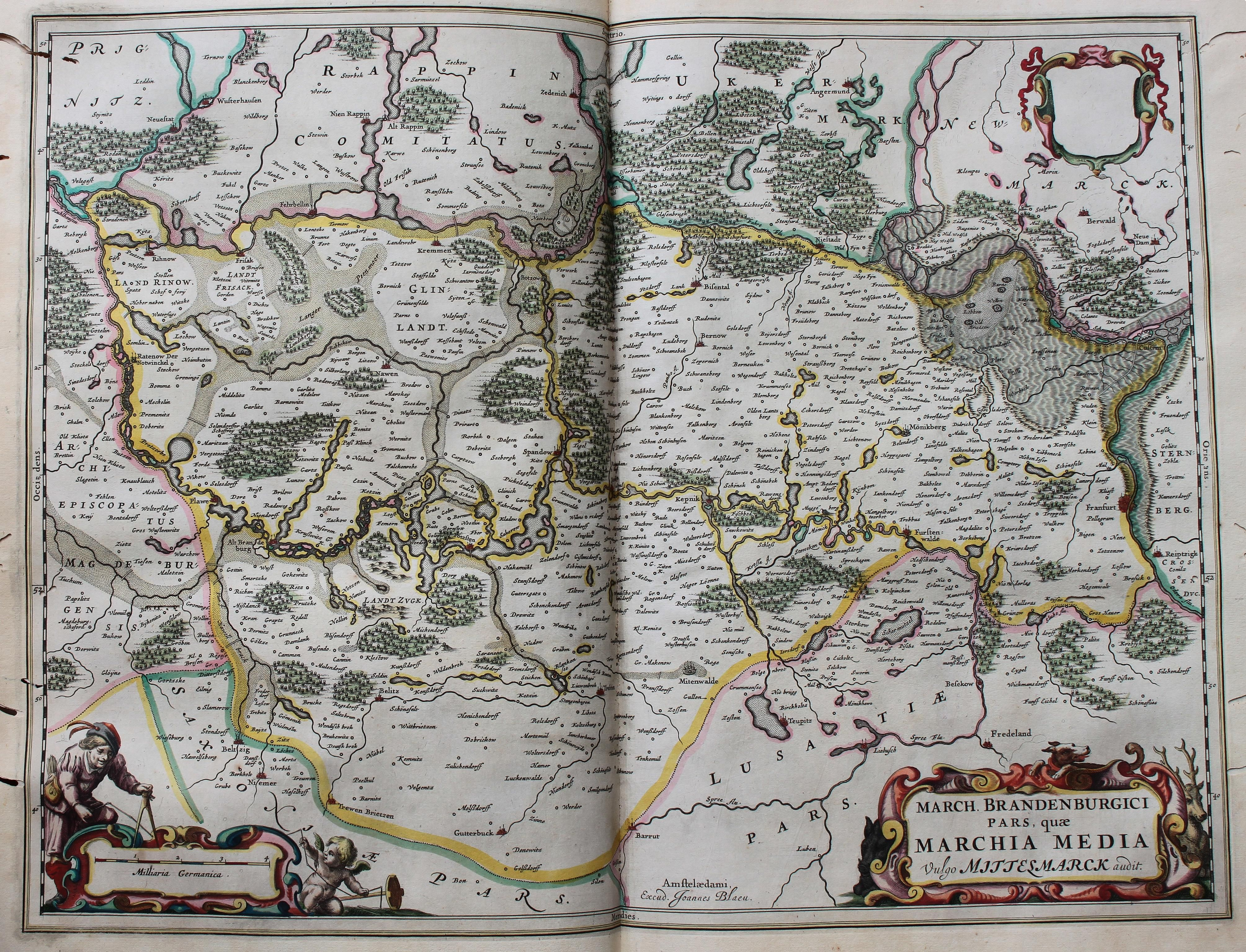 Descripción bibliográfica: Geographia Blaviana. - [Amsterdam : Juan Blaeu, 1659] . - [32], VI, 96 p., 34 f., h. 35a, 35b, 35c, 35d, 36-44 f., 34, [2], 36-40, [2], 43-70 [i. e. 75], [1] f., [20] p. de map., [9] f. de map., [4] f. pleg. de map., [2] f. de plan., [2] f. ge grab. : |bil. ; |cFol. marca major (57 cm.) . - En la dedicatoria a Felipe IV: "Presenta ... El Atlas Universal y Cosmographico de los orbes y terrestre ... Juan Blaeu" . - Título tomado del frontispicio. -- Privilegio fechado en 1659. -Errores de pag. - Sign.: 1, *2, **3, ***-****2, a-e2, A-I2, K1, L-Z2, Aa-Dd2, 4 2, Ee-Ff2, A-I2, K1, L2, M1, N-Y2, Z5, Aa-Dd2, Ee1, A-D2, E-F1, G-I2, K-L1, M-O2, P1, Q-Z2, Aa-Bb2, Cc1, Dd3, Ff-Zz2, Aaa-Bbb2, . - Frontispicio grab. col. -- Incluye un total de 49 il. entre map., plan. i grab. Materia: Atlas - Obras anteriores a 1800 Impresor: Blaeu, Joan, 1596-1673, imp. Lugar de impresión: Holanda. Amsterdam Localización: Vea la ilustración en su contexto Visite también la exposición "Cartografía histórica en la Biblioteca de la Universidad de Sevilla"